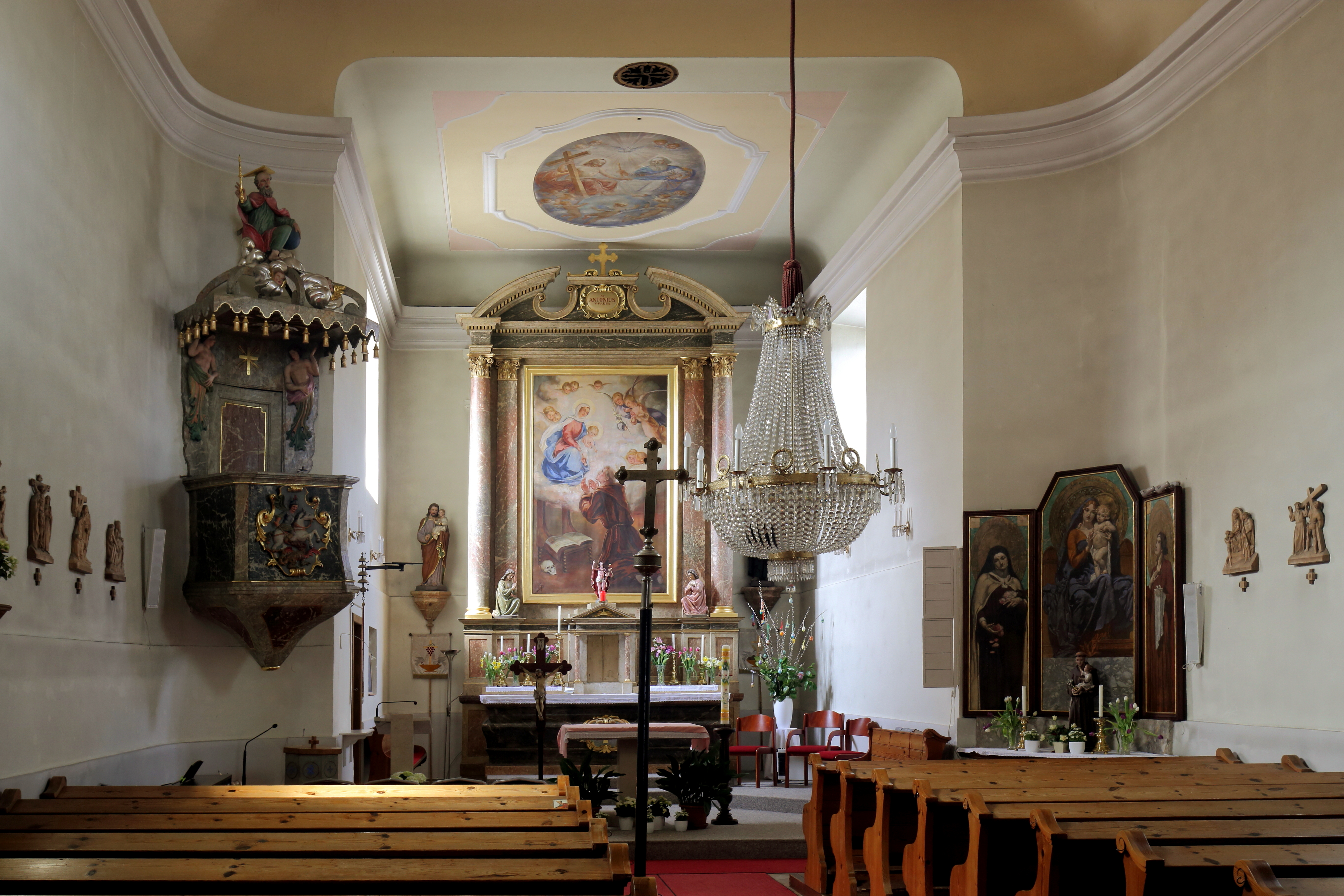 Innenansicht der katholischen Pfarrkirche hl. Antonius von Padua in Manhartsbrunn, ein Ortsteil der niederösterreichischen Marktgemeinde Großebersdorf.